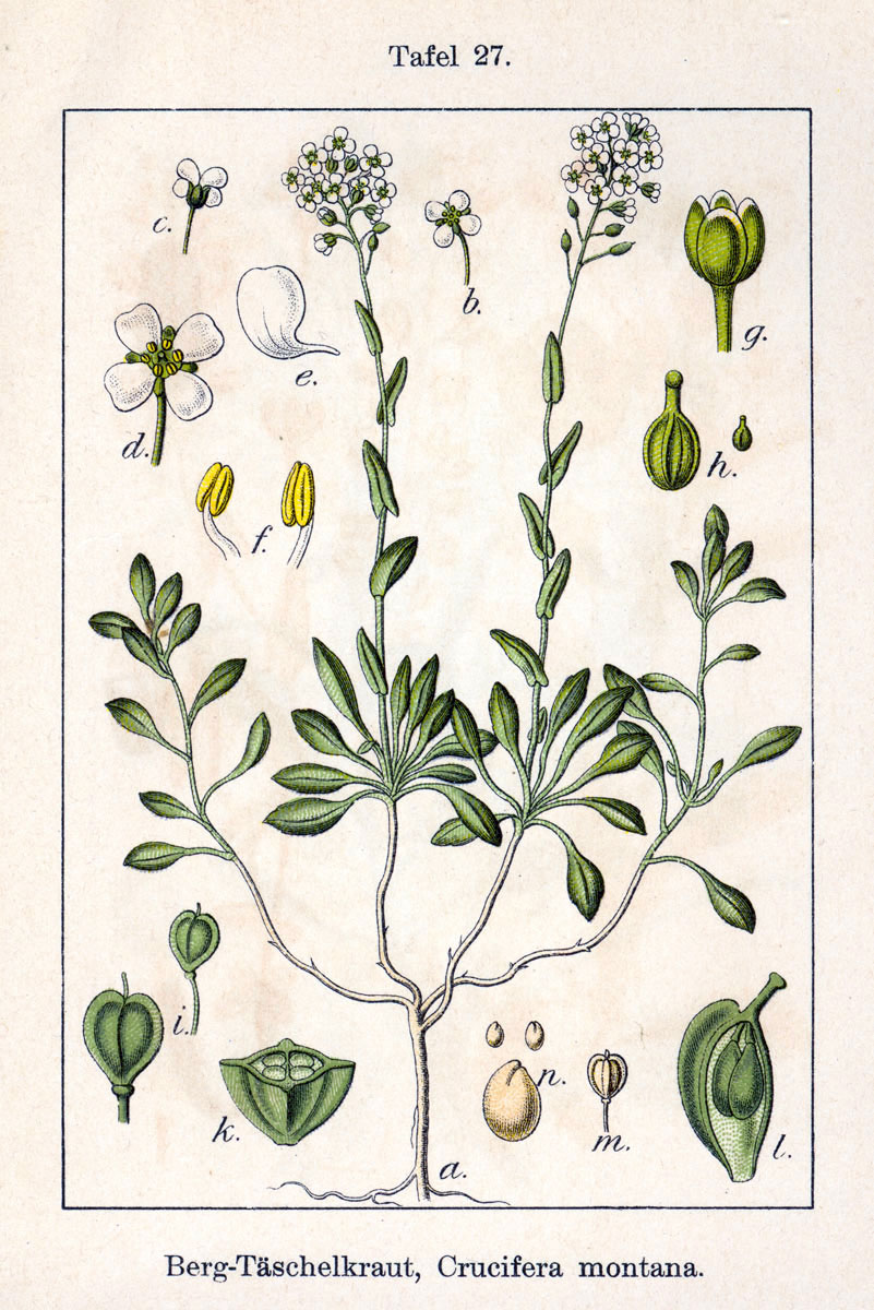 Thlaspi montanum L., syn. Noccaea montana subsp. montana, Crucifera montana (L.) E.H.L.Krause Original Description Berg-Täschelkraut, Crucifera montana